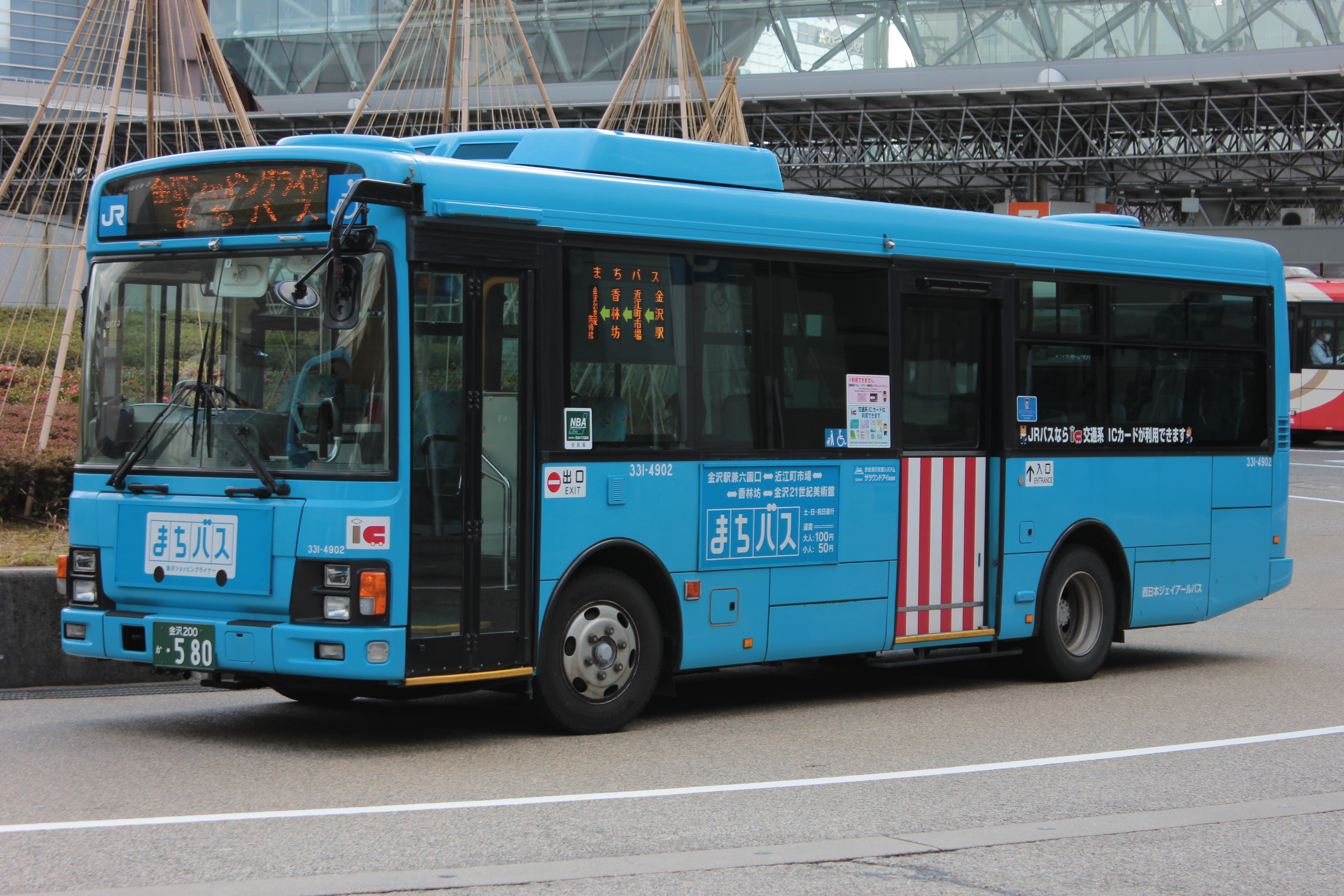 まちバス（金沢駅東口にて） Canon EOS Kiss X5